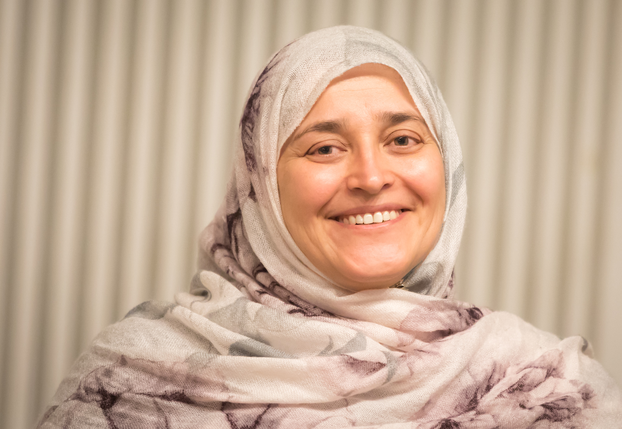 Jamila Afghani, Frauenrechtlerin und Friedensaktivistin aus Afghanistan, 2020 in Köln